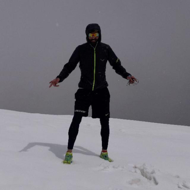 ایمان کوشکی قهرمان جهانی و کشوری اسکای رانینگ و پله نوردی حین تمرین در توچال